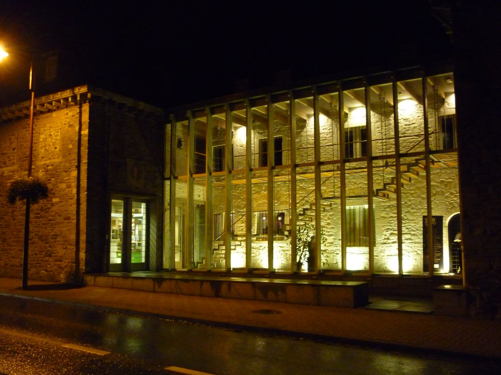 Le Musée en Piconrue (Bastogne) de nuit.